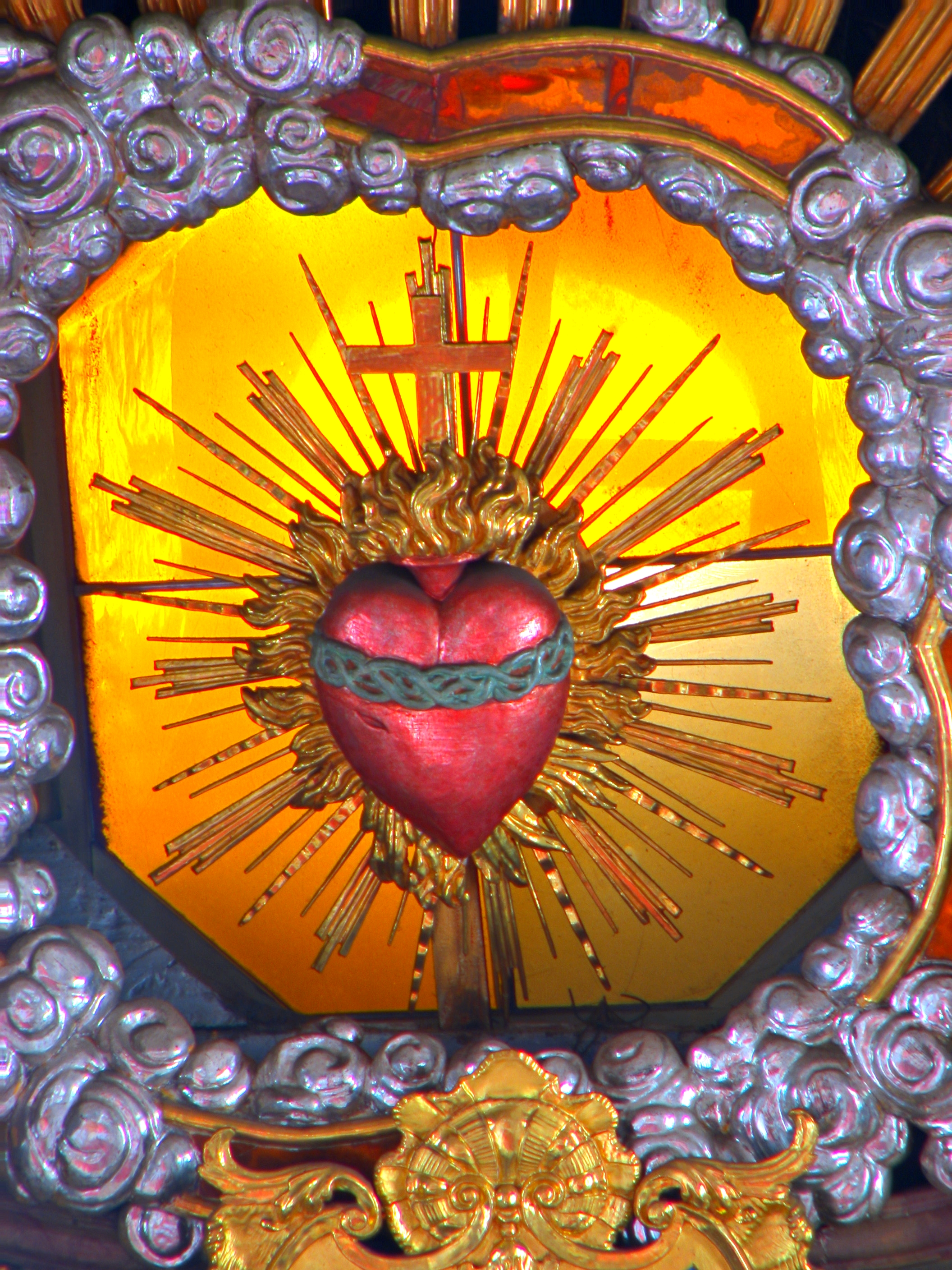 HerzJesu St Michael Lochhausen